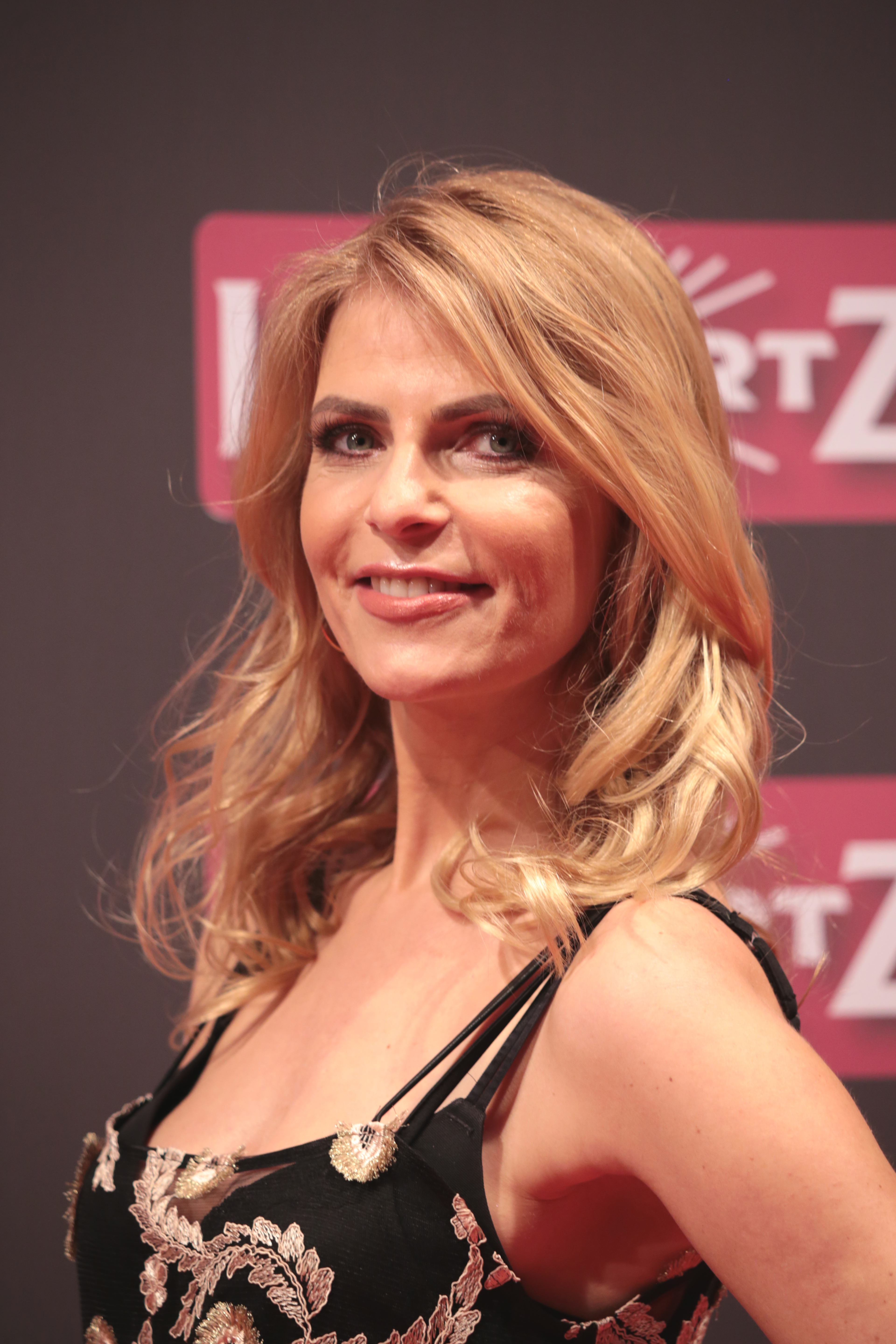 Tanja Bülter bei der Lambertz Monday Night 2018.